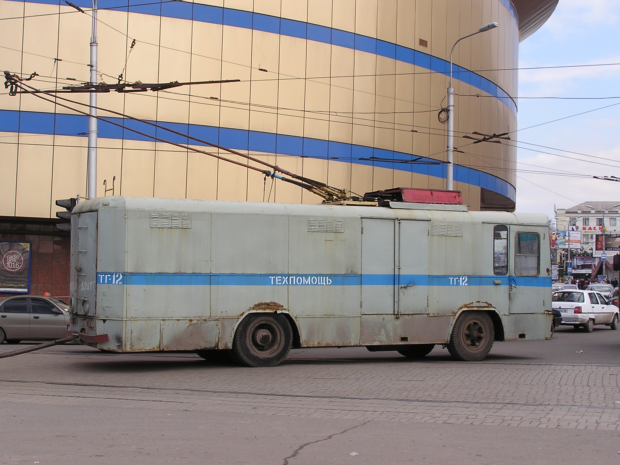 Донецкий троллейбус